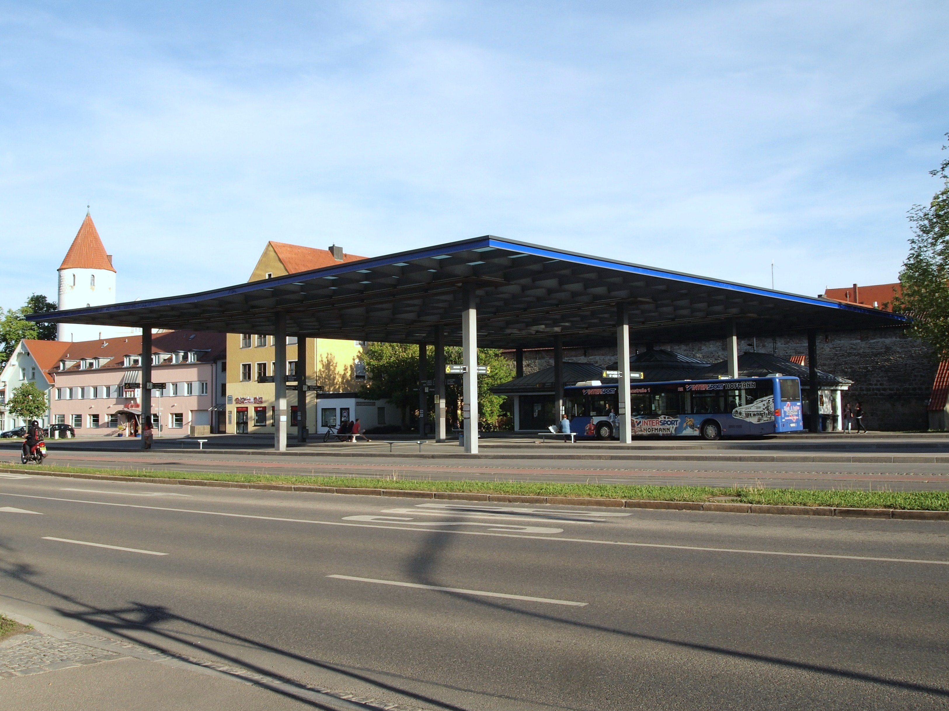 Kaufbeuren, Plärrer/Josef-Landes-Straße, Busbahnhof (Blick vom V-Markt), Mai 2012